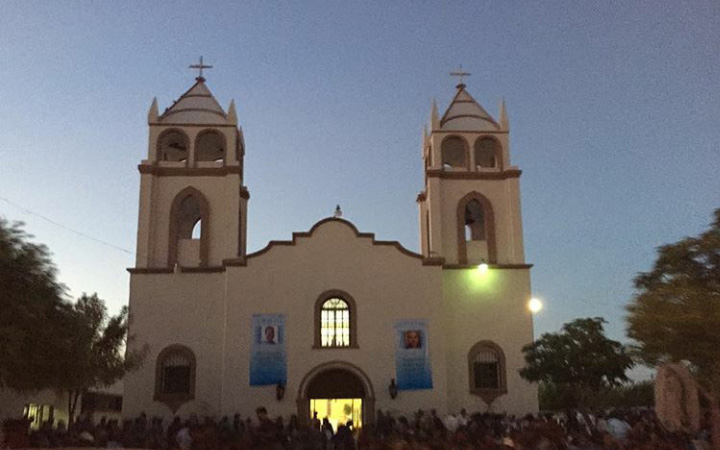 Parroque Nuestra Señora de Guadalupe, Guadalupe, Chihuahua.